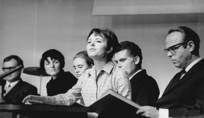 Zentralbild Katscherowski 27.10.68 Berlin: Zur Eröffnung der "Woche des Buches" Im Maxim-Gorki-Theater fand am 27. Oktober eine literarisch-musikalische Matinee "Denn das Gedicht ist immer jung" zur Eröffnung der "Woche des Buches 1968" 1968 statt. Auf unserem Foto liest Monika Lennartz. Rechts: Christoph Engel und halbrechts (verdeckt): Helmut Müller-Lemkow.